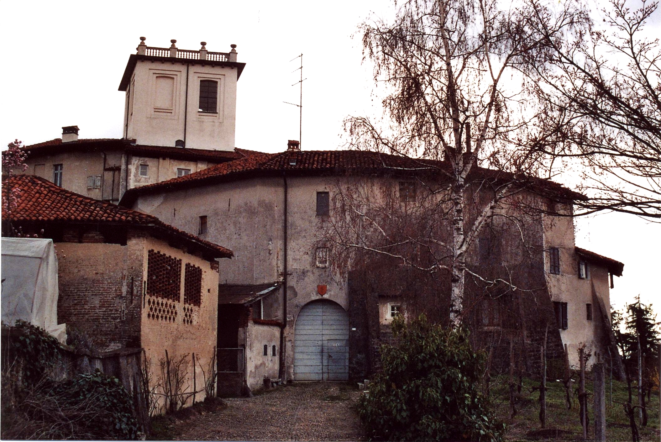 Fara Novarese (NO), Castrum Vetus o Castellone, l'ingresso.